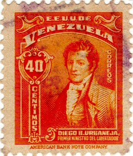 Diego B. Urbaneja Ministro del LIbertador estampilla venezolana de 40 centimos emitida en 1948